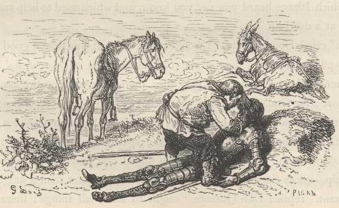 Sancho Pança avalia a dentadura de Dom Quixote